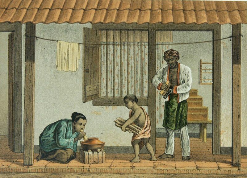 Litho. Litho naar een oorspronkelijke aquarel van Rappard. Een bediendenkamer in de bijgebouwen van een Europese woning